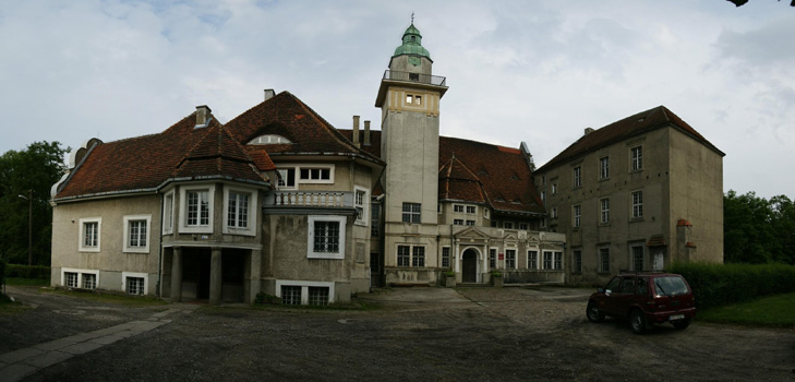 Płoty Zamek Ostenów